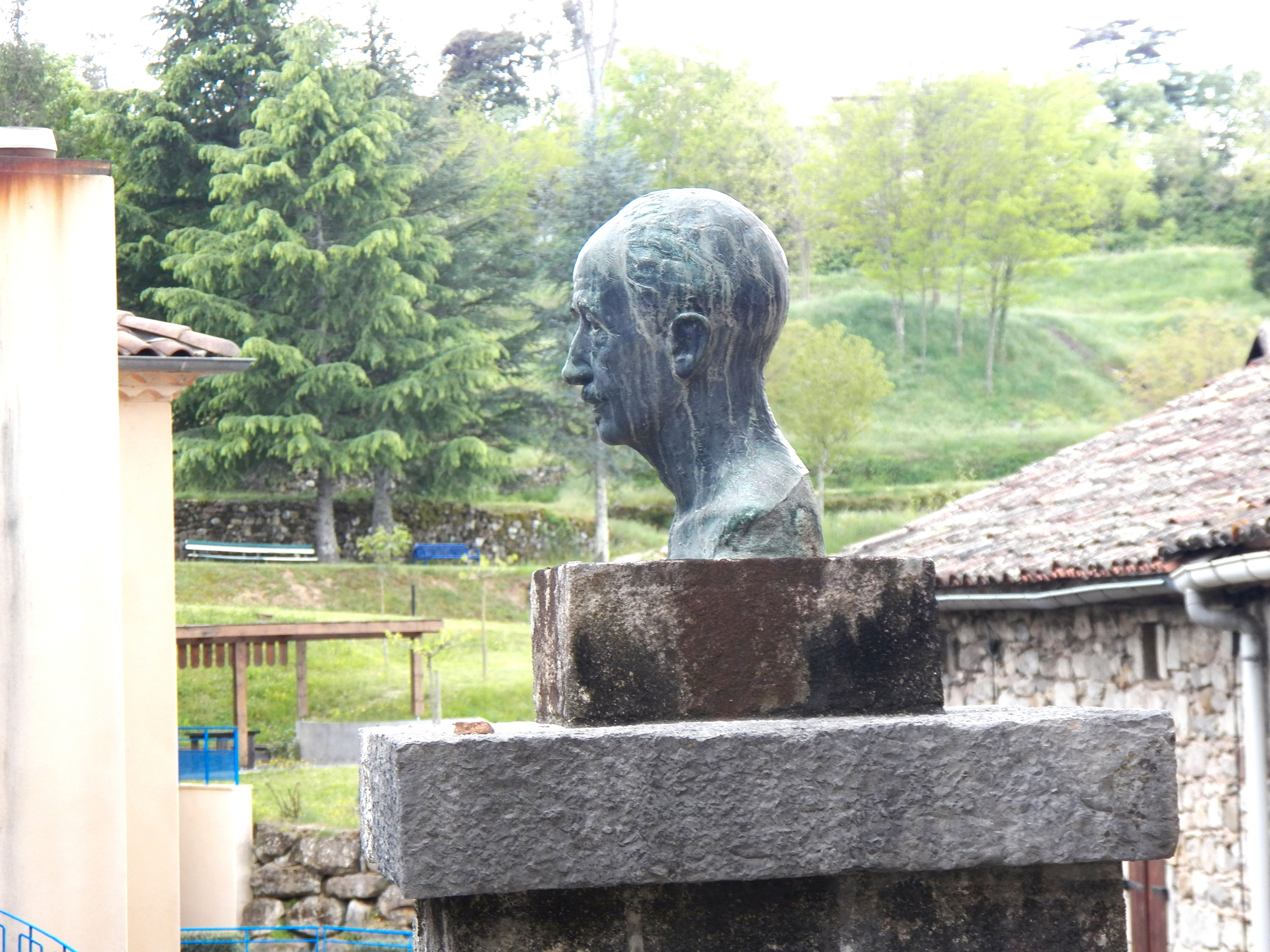 Buste d'un ancien député.